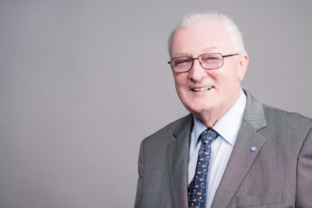 Porträtfotografie von Klaus Weigelt.